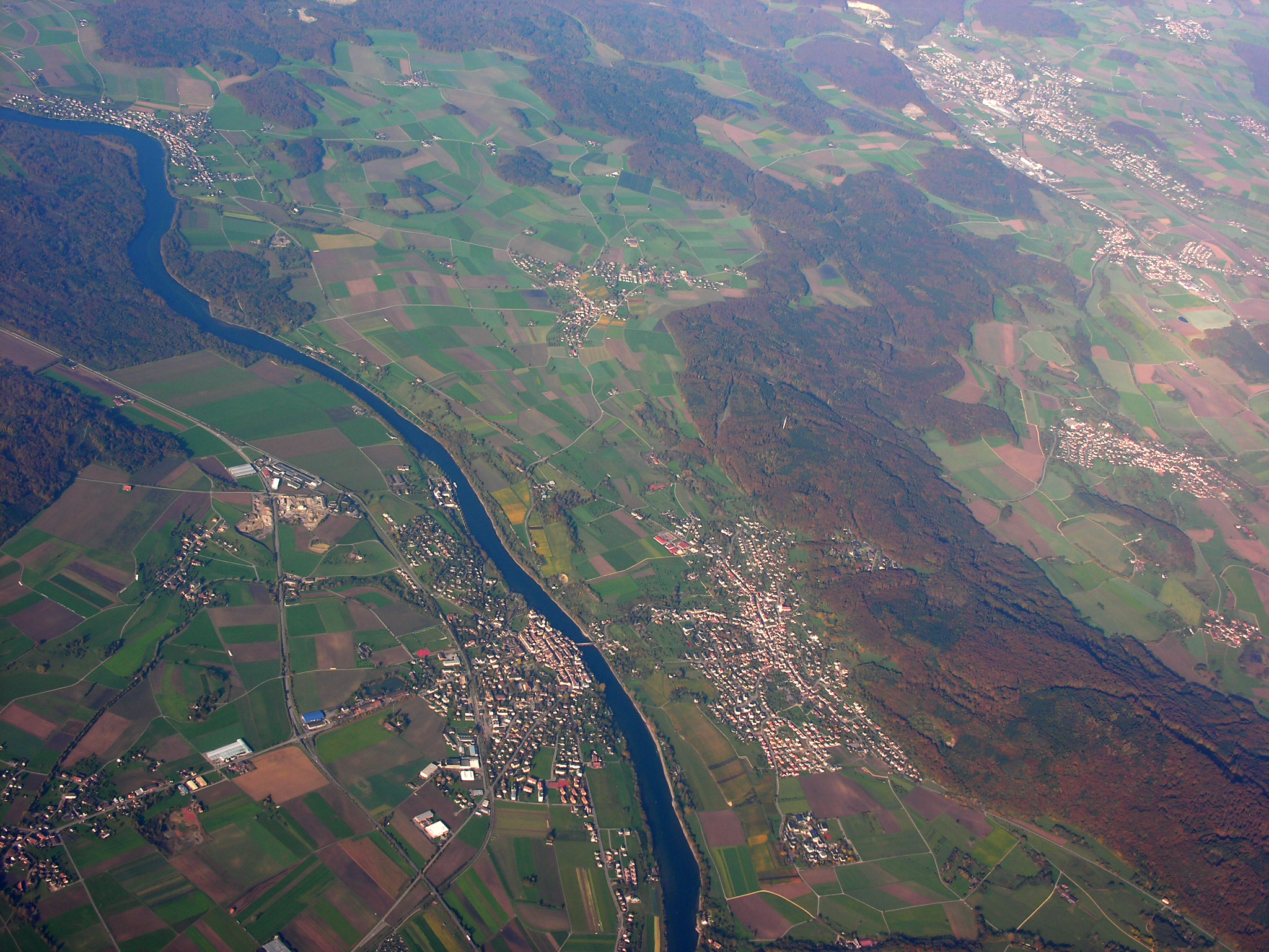 Switzerland, Thurgau, aerial view of Dörflingen, Diessenhofen and Gailingen